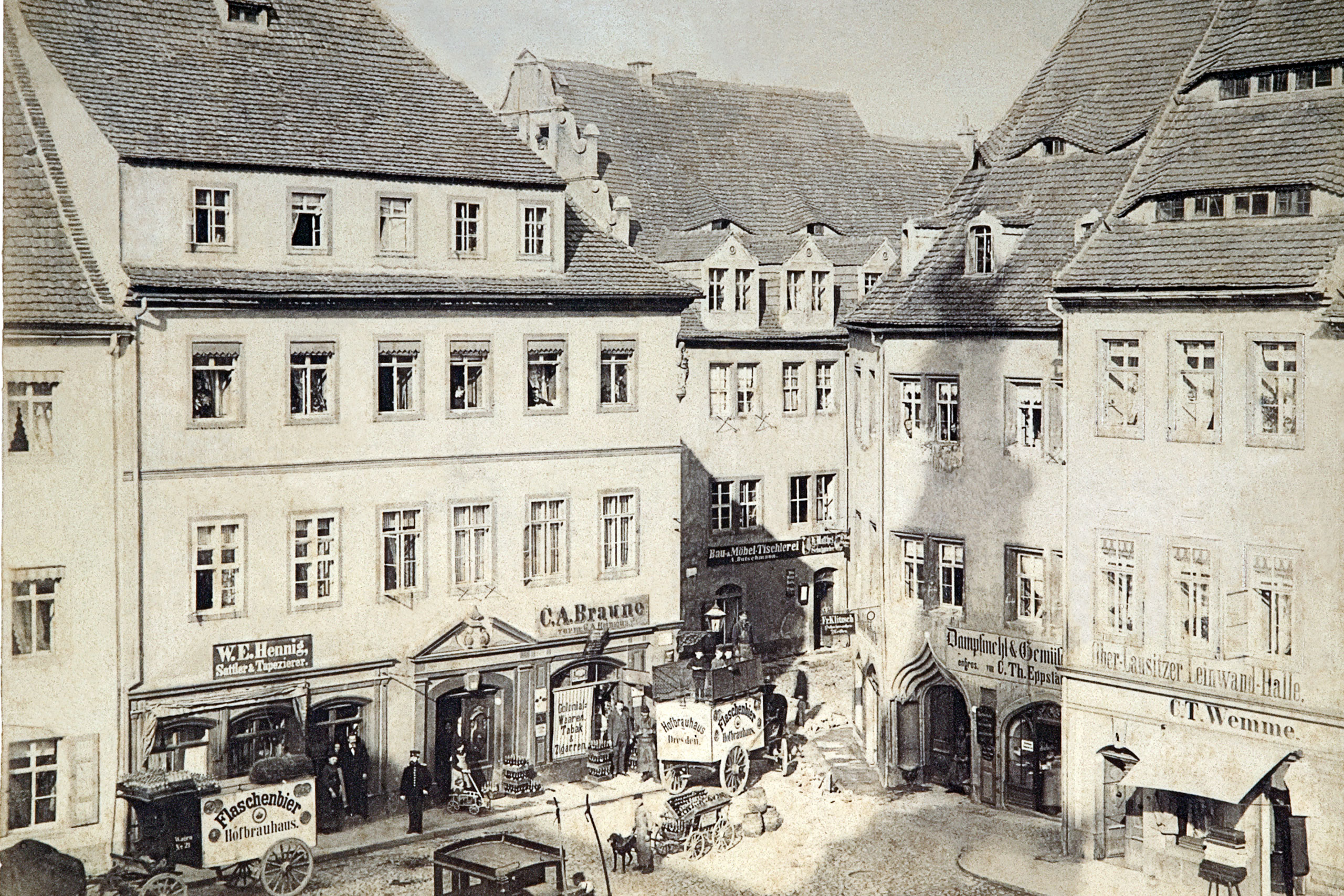 Nord-Ost-Ecke des Pirnaer Marktes mit Peter-Ulrich-Haus rechts der Ecke zur Töpfergasse